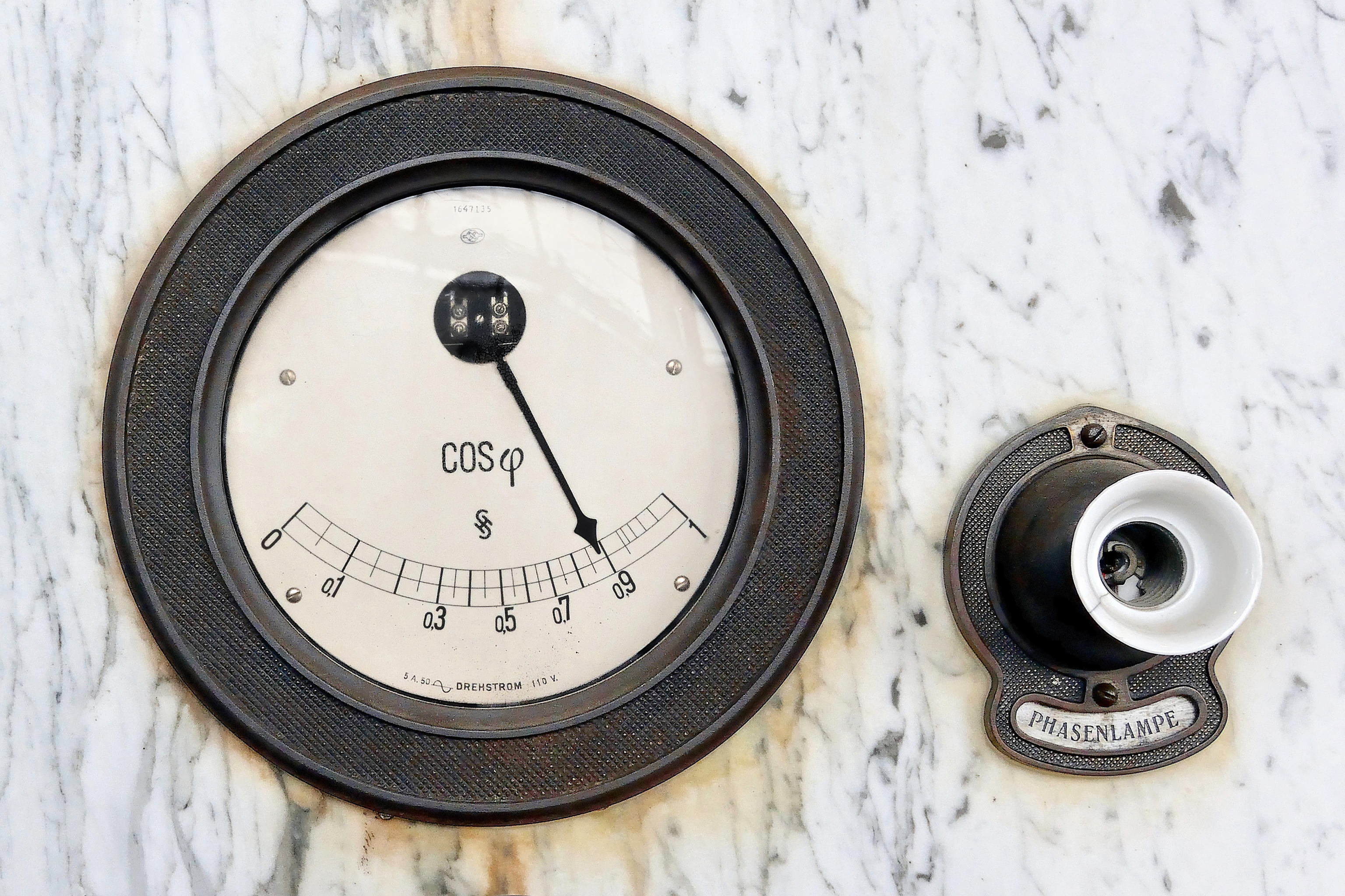 Impressionen von der Zeche "Zollern 2/4" in Dortmund.Hier: Messgerät für den Leistungsfaktor in der Maschinenhalle